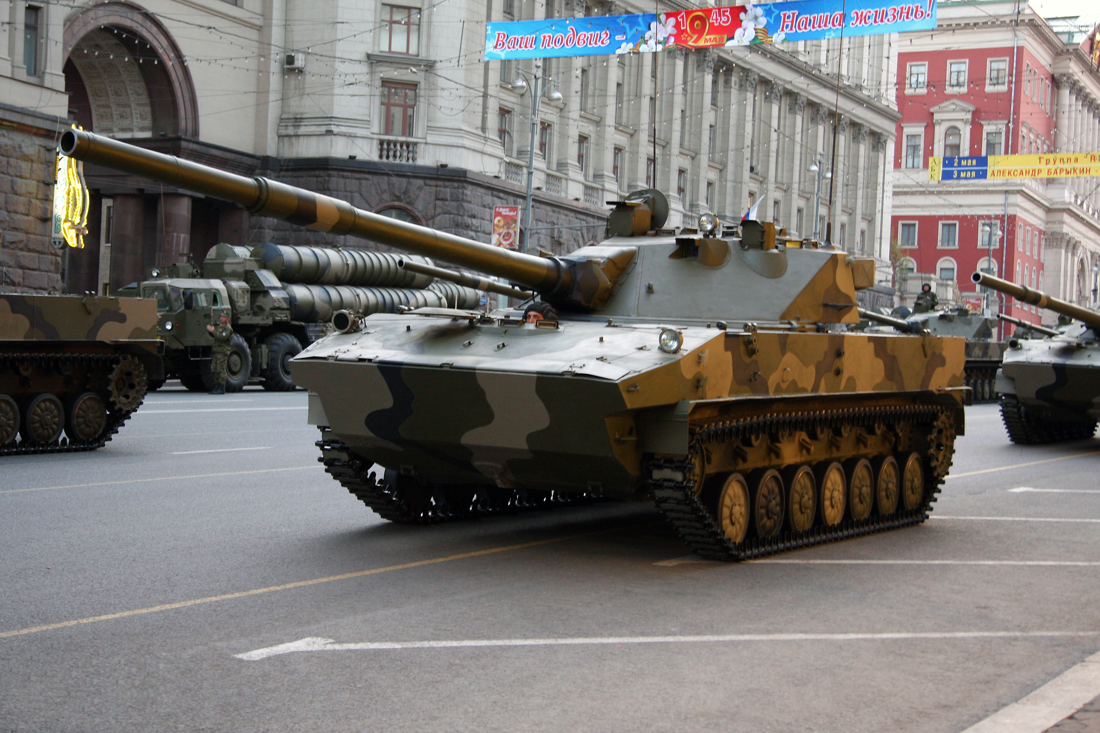 Спрут-СД